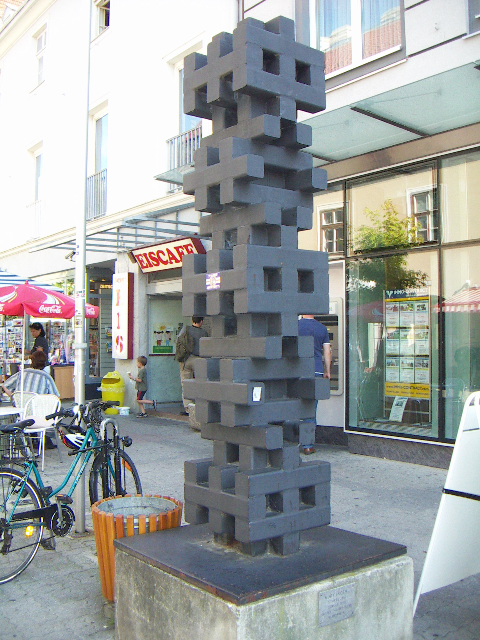 Kurt Ingerl, Eisenplastik: Stapelung, aus 1971 bis 1972, erworben vom Kulturreferat der Niederösterreichischen Landesregierung, situiert in der Herzog-Leopold-Straße 3 in Wiener Neustadt